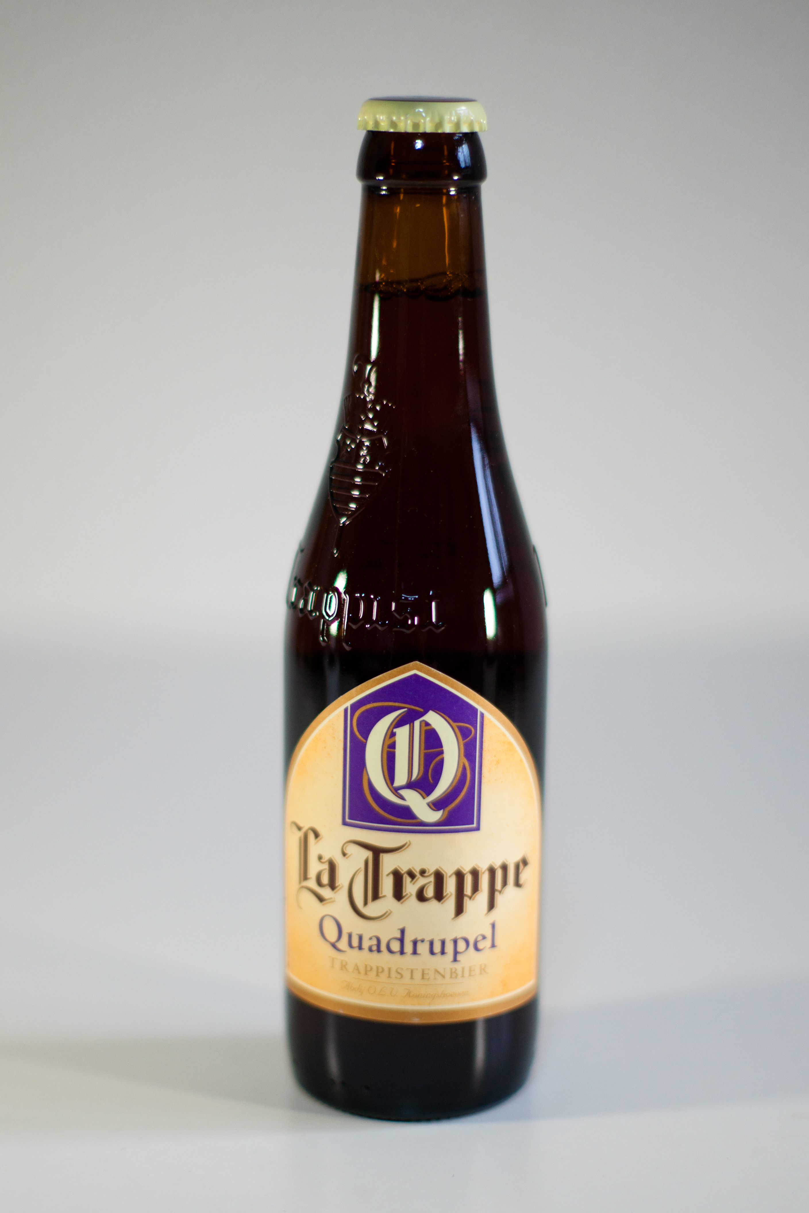 La Trappe, Quadrupel.